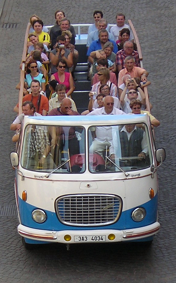 Škoda 706 RTO vyhlídkový projíždí pod Pražskou branou ve Vysokém Mýtě.